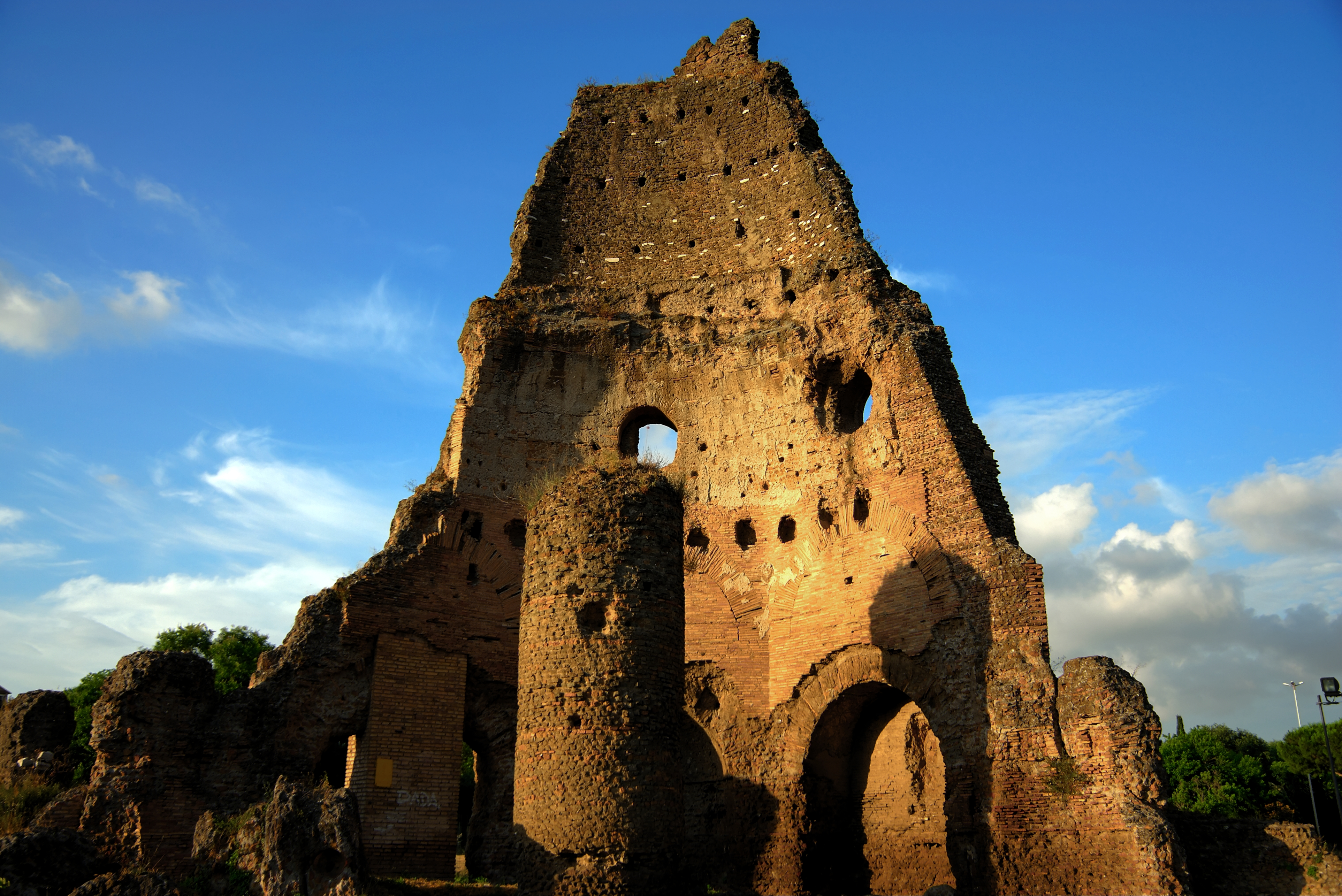 Villa Gordiani This is a photo of a monument which is part of cultural heritage of Italy.